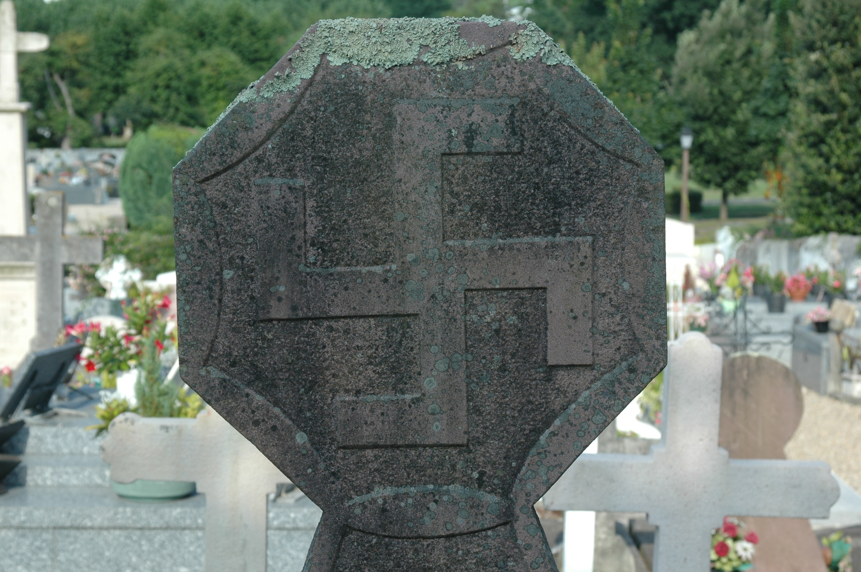 Ascain, stèle svastika. Photo prise le 23/07/06 par Harrieta171